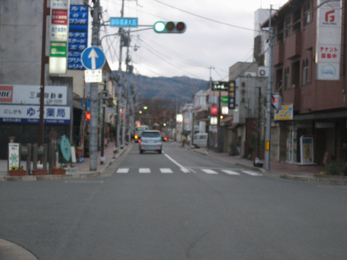 御薗橋通を御薗橋通大宮交差点から撮影